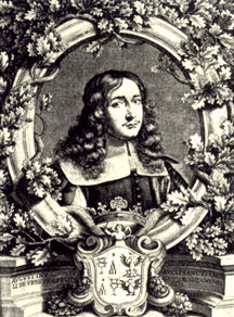 Agostino Chigi (1634-1705) samtida gravyr